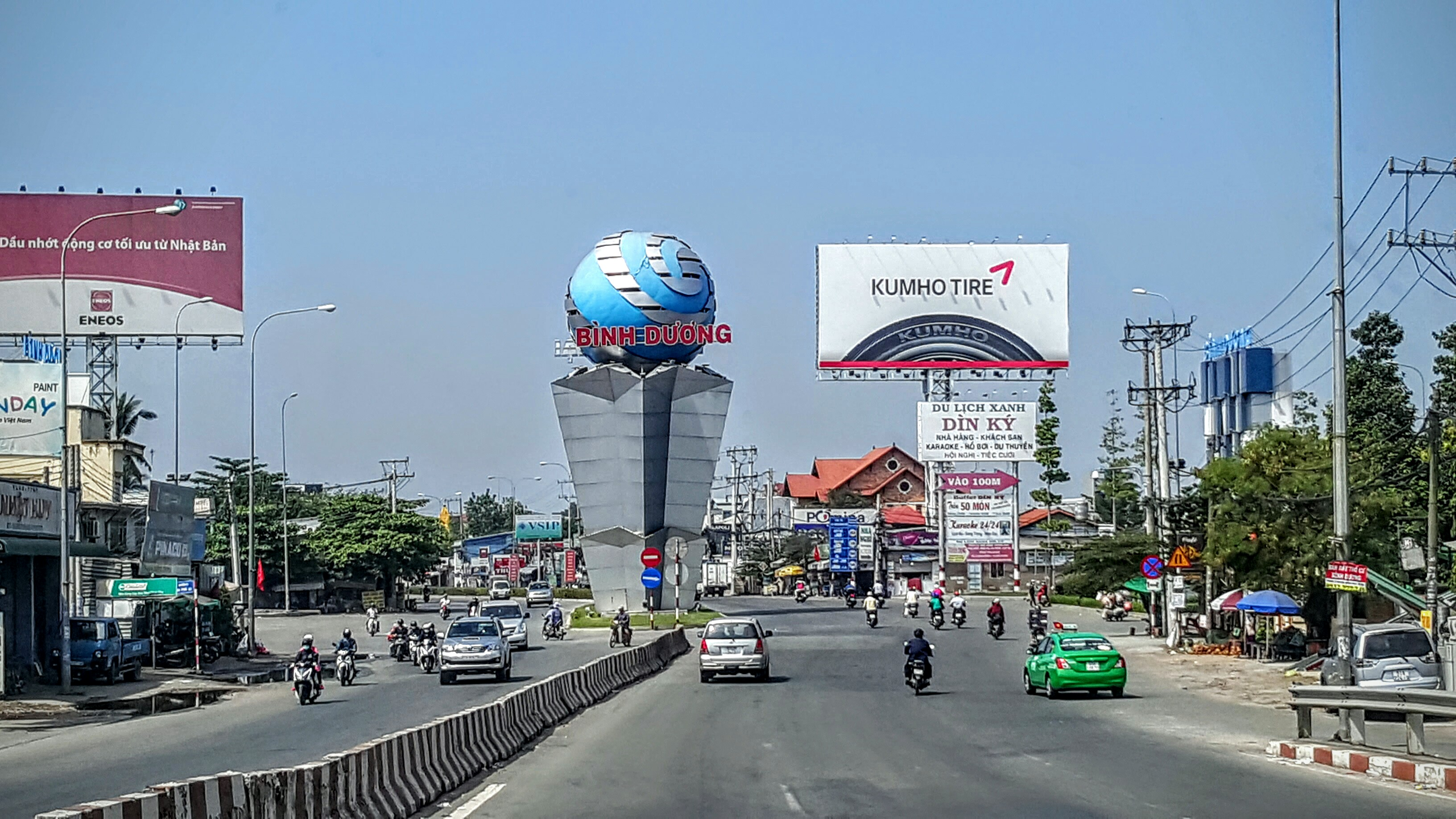 Vĩnh Phú, tx. Thuận An, Binh Duong, Vietnam